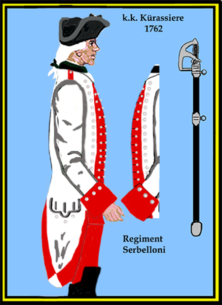 Österreichisches Kürassier-Regiment „Serbelloni“ (Aus: L.& F. Funcken - „L'Uniforme et les Armes des soldats de la guerre en dentelle II“) Castermann (Tournai 1976)